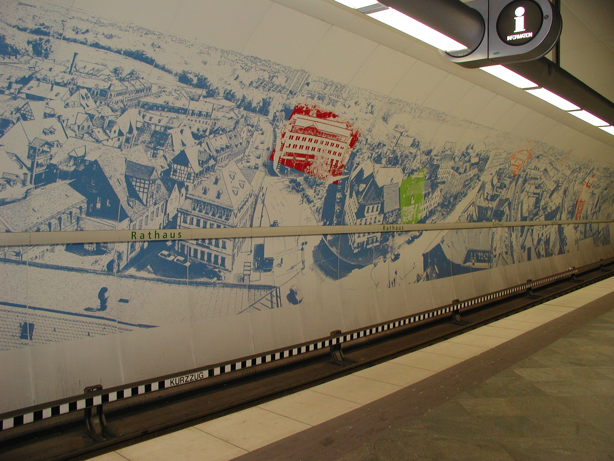 U-Bahnhof Fürth Rathaus